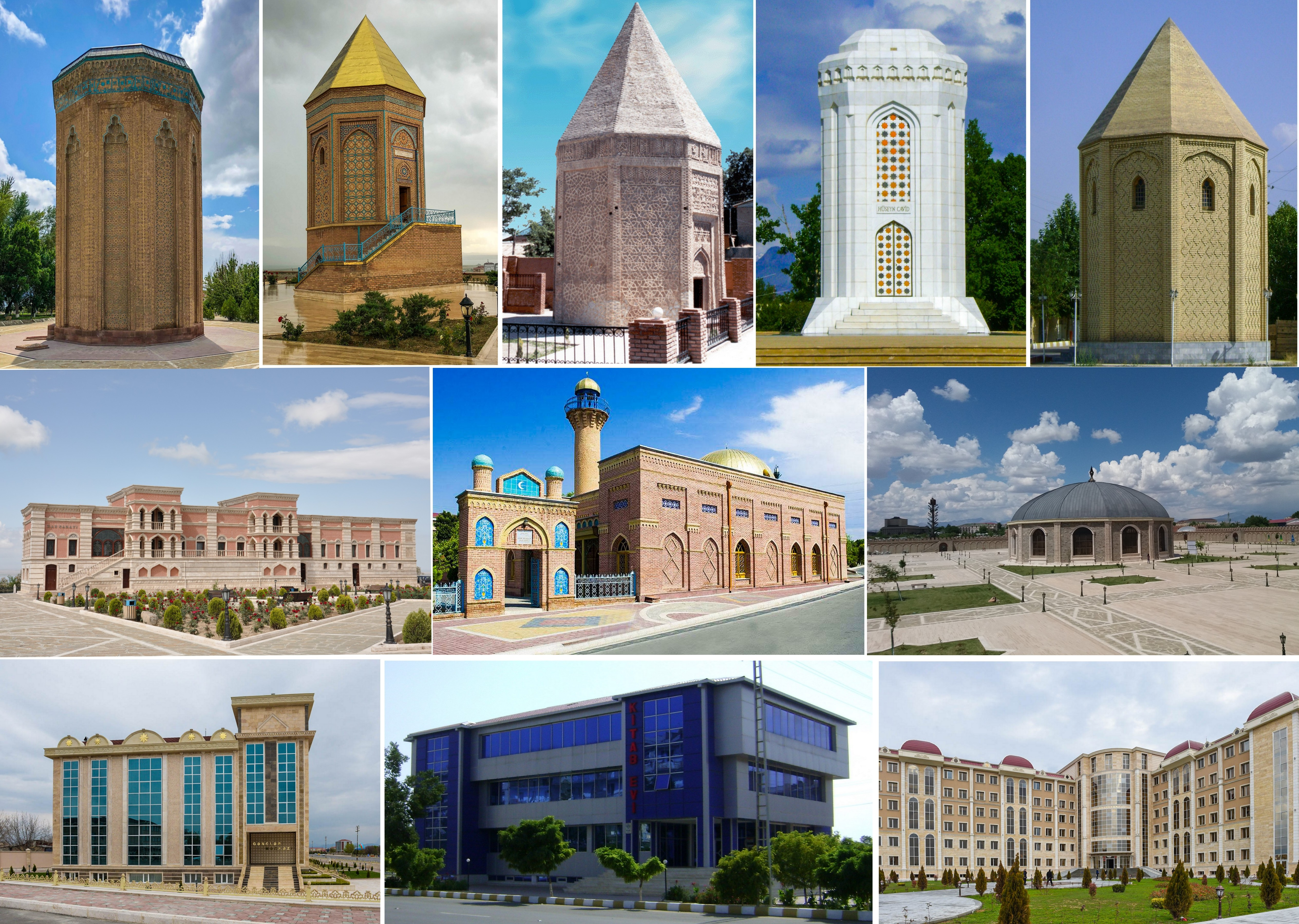 Montage of pictures of Naxçıvan used for the specific article. Composition of these pictures: File:Naxcivanqala.jpg File:Naxçıvan Gənclər sarayı.jpg File:Naxçıvan Mərkəzi Xəstəxanası.jpg File:Nakhchivan city library.JPG File:Huseyn Javid Mausoleum at Nakhchivan.jpg File:Palace of Nakhchivan Khans.jpg File:Naxçıvan Cümə məscidi.jpg File:Mömünəxatun türbəsi 2018.jpg File:Nuh türbəsi.jpg File:Nakhichevan Mausoleum.jpg File:Nakhchivan city khalideyi kubra tomb.JPG